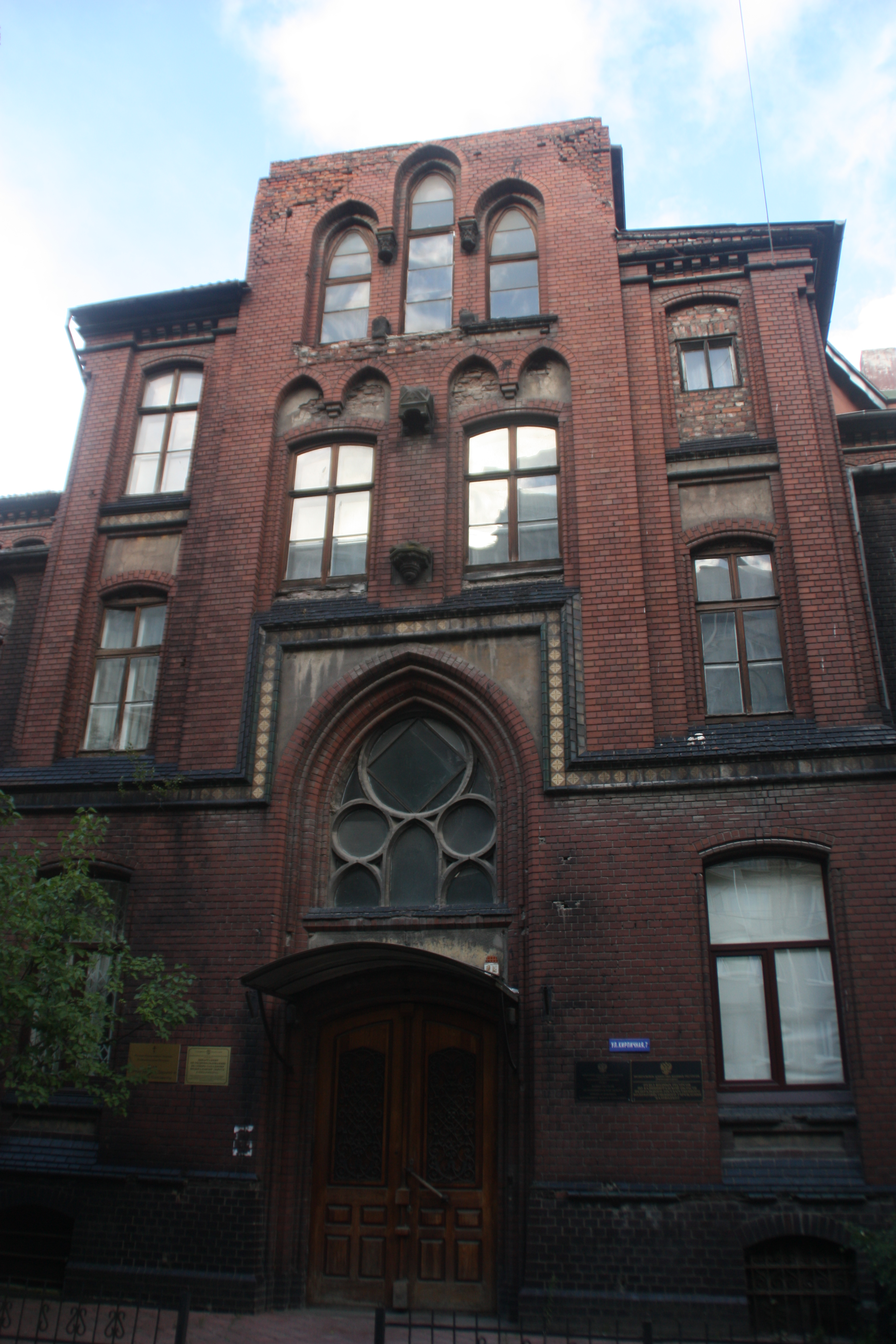 Здание больницы святой елизабеты (Калиниградская область, Калининград, кирпичная улица, 7)